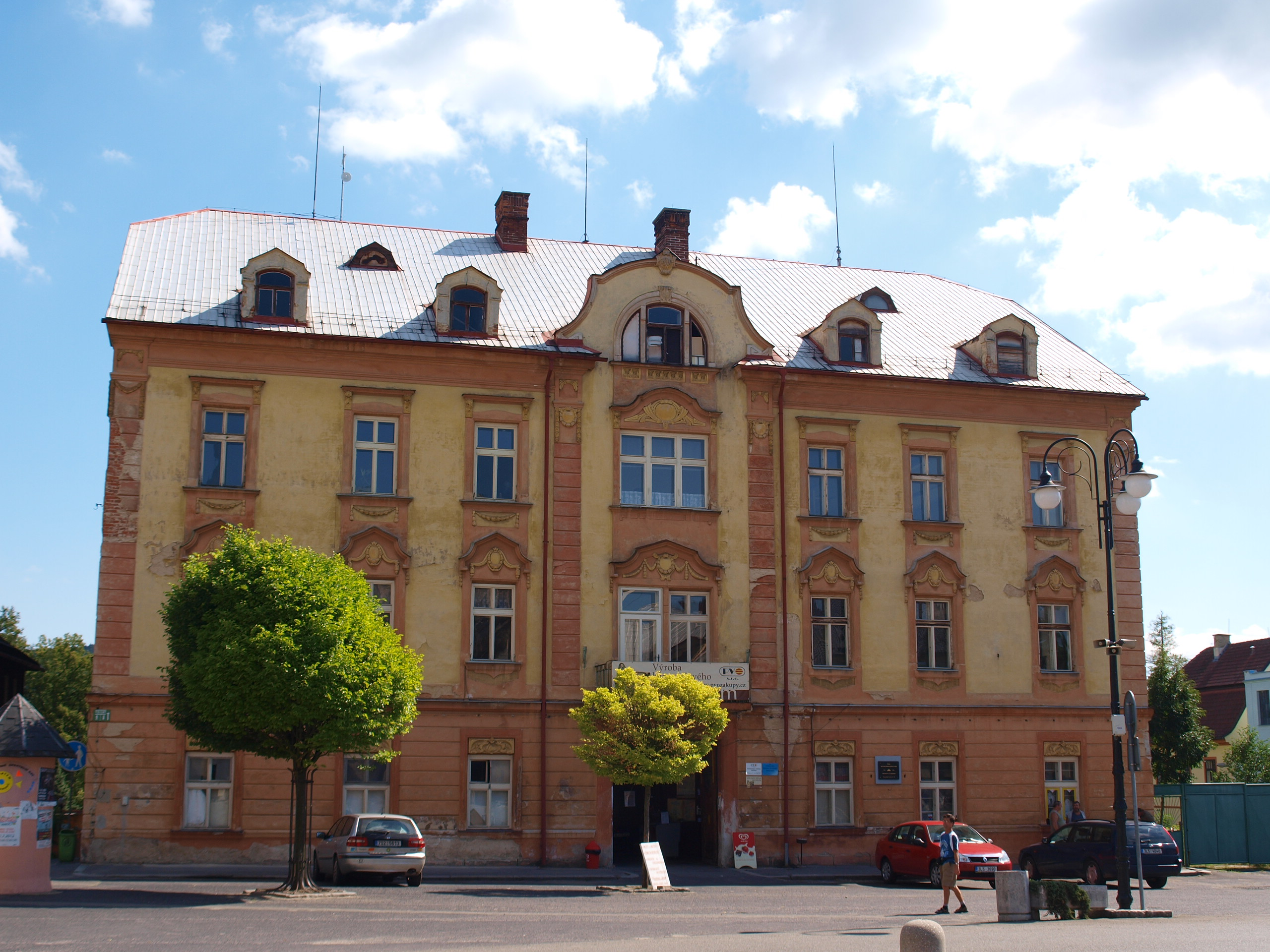 Dům na náměstí v Zákupech